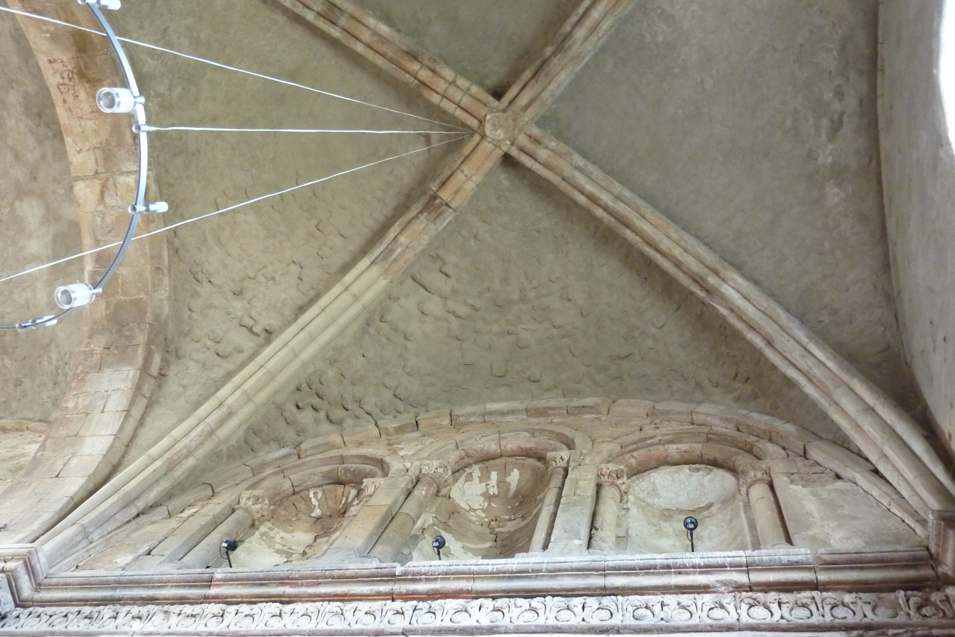 Propstei Buchholz, Kirche Sankt Servatius, Gewölbe und Fries